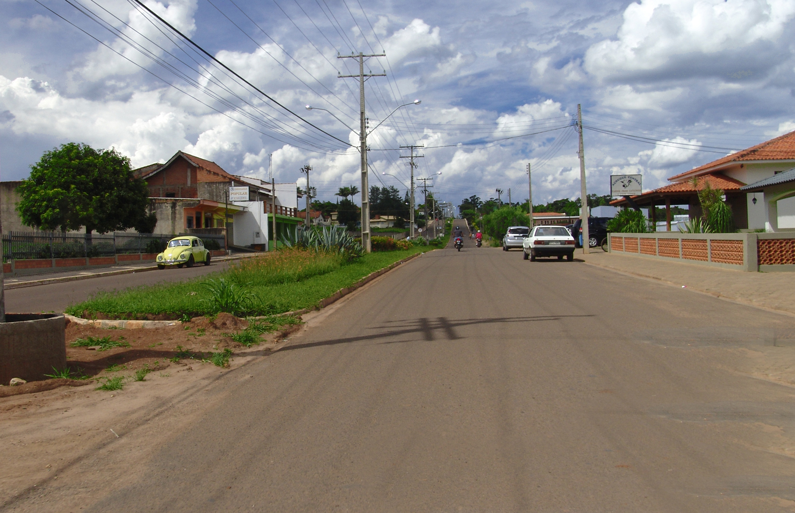 Uma das avenidas no Distrito de Holambra II, Paranapanema, São Paulo, Brasil